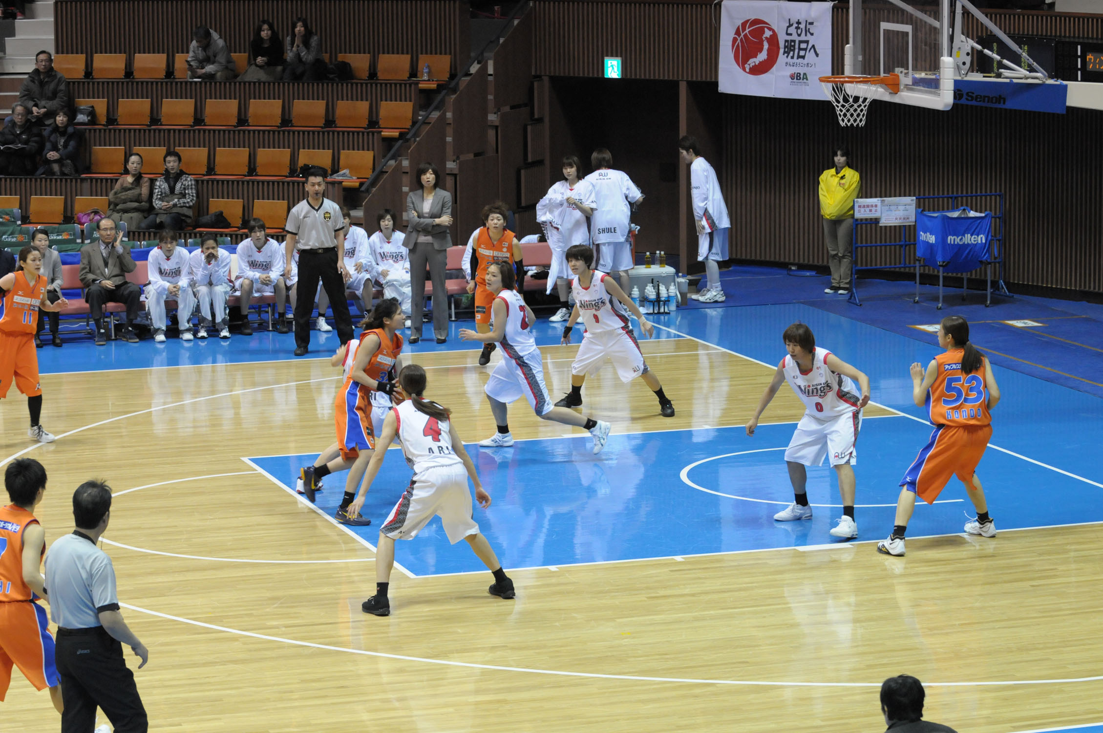 2013年全日本総合バスケットボール選手権大会3回戦、アイシン・エイ・ダブリュ ウィングス対新潟アルビレックスBBラビッツ。代々木第二体育館で。